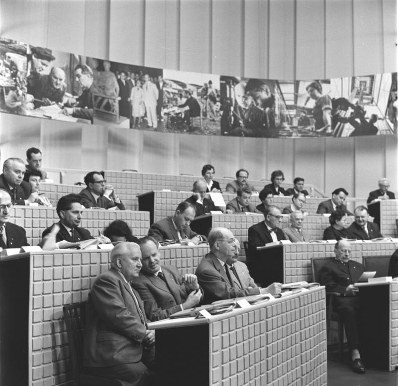 ADN-ZB/Kollektiv 25.4.1964 2. Bitterfelder Konferenz (1.Tag) Die 2. Bitterfelder Konferenz wurde am 24.4.1964 im Kulturpalast des Elektrochemischen Kombinats der Chemiestadt eröffnet. Veranstalter sind die Ideologische Kommission beim Politbüro des ZK der SED und das Kulturministerium. Über 1000 Künstler und Kulturfunktionäre aus der DDR nehmen teil. Kurz vor Konferenzbeginn. Blick auf einen Teil des Präsidiums mit Willi Bredel, Otto Gotsche, Alexander Abusch, Stellvertreter des Vorsitzenden des Ministerrates, Erwin Strittmatter, und Walter Ulbricht, Erster Sekretär des ZK der SED u. Vorsitzender des Staatsrates, (v.l.n.r.).